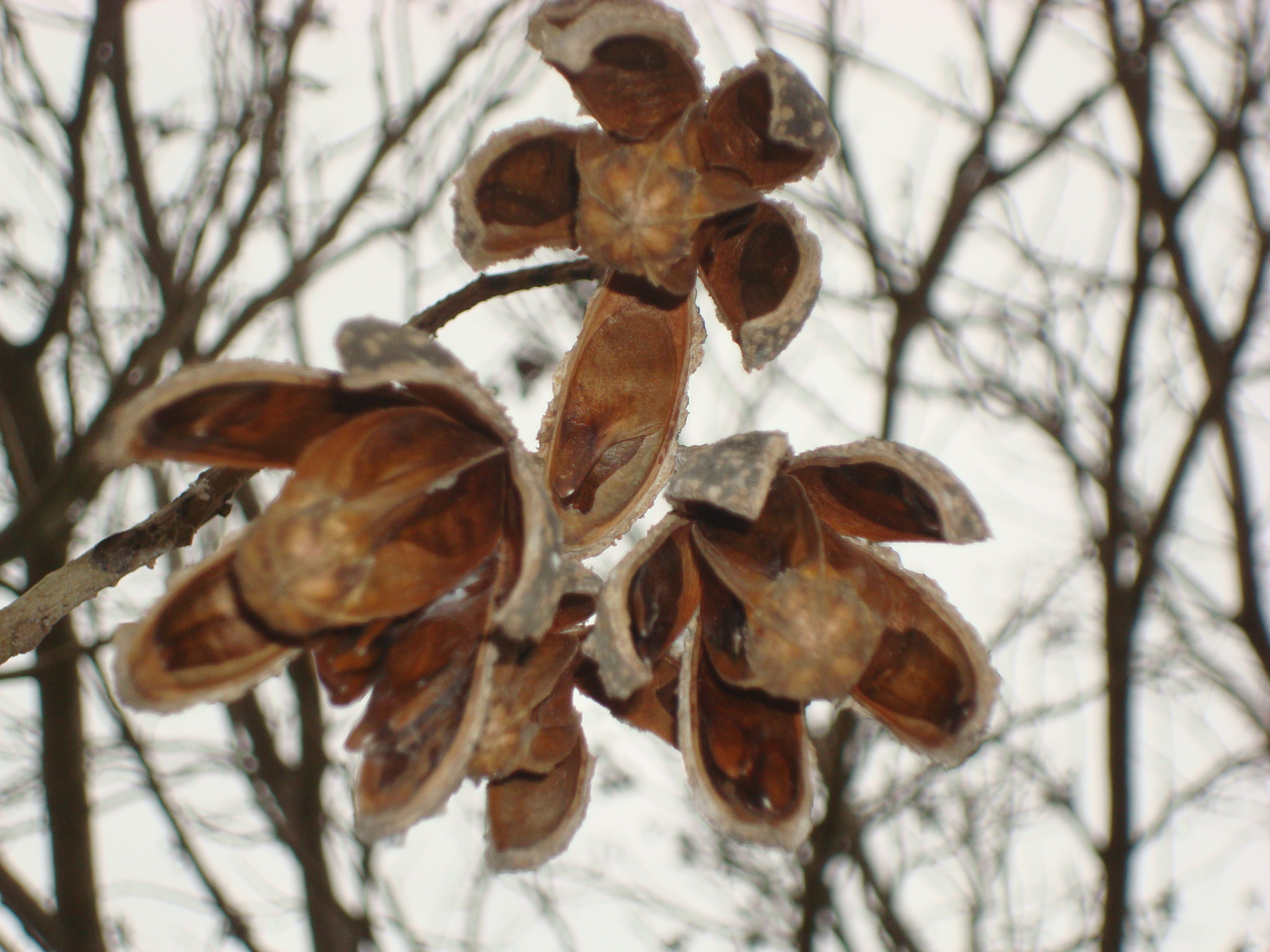 Tres semillas Cedro